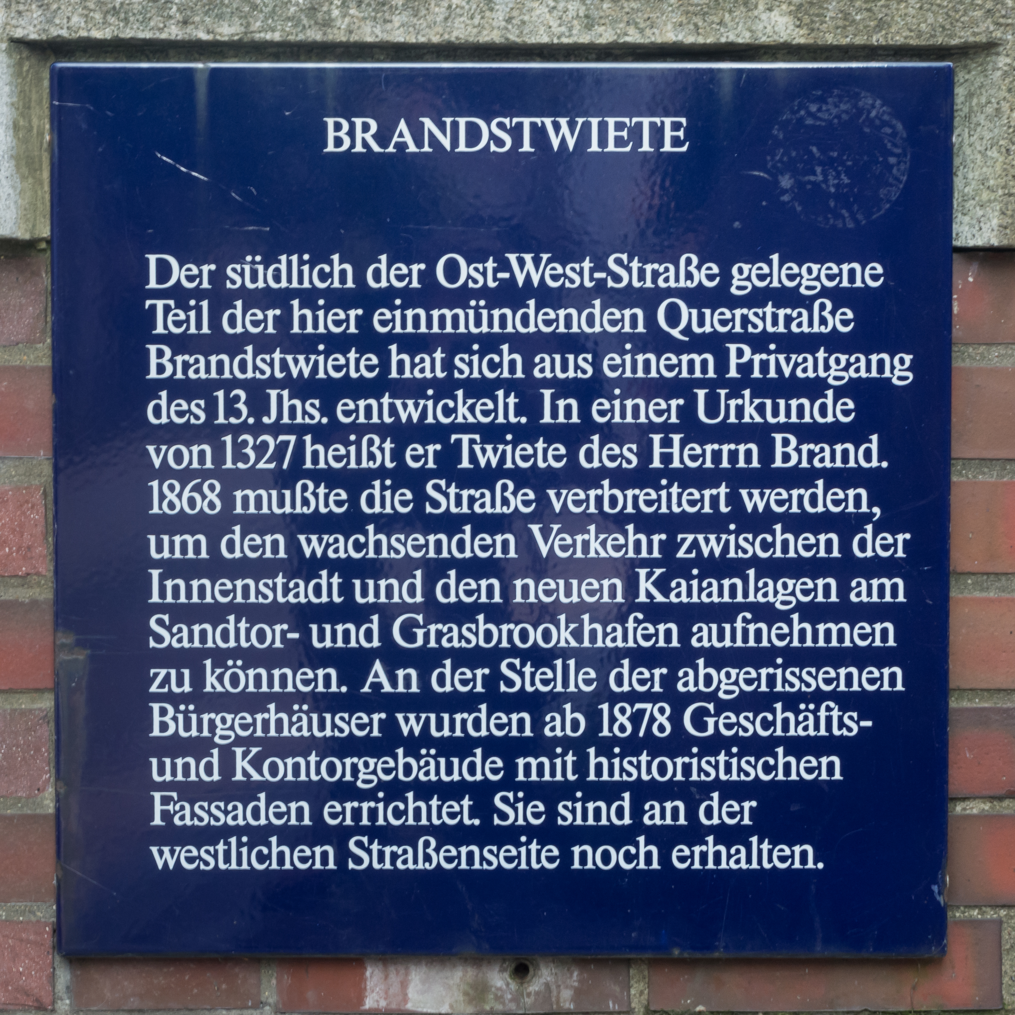 Brandstwiete in Hamburg-Altstadt. This is a photograph of an architectural monument.